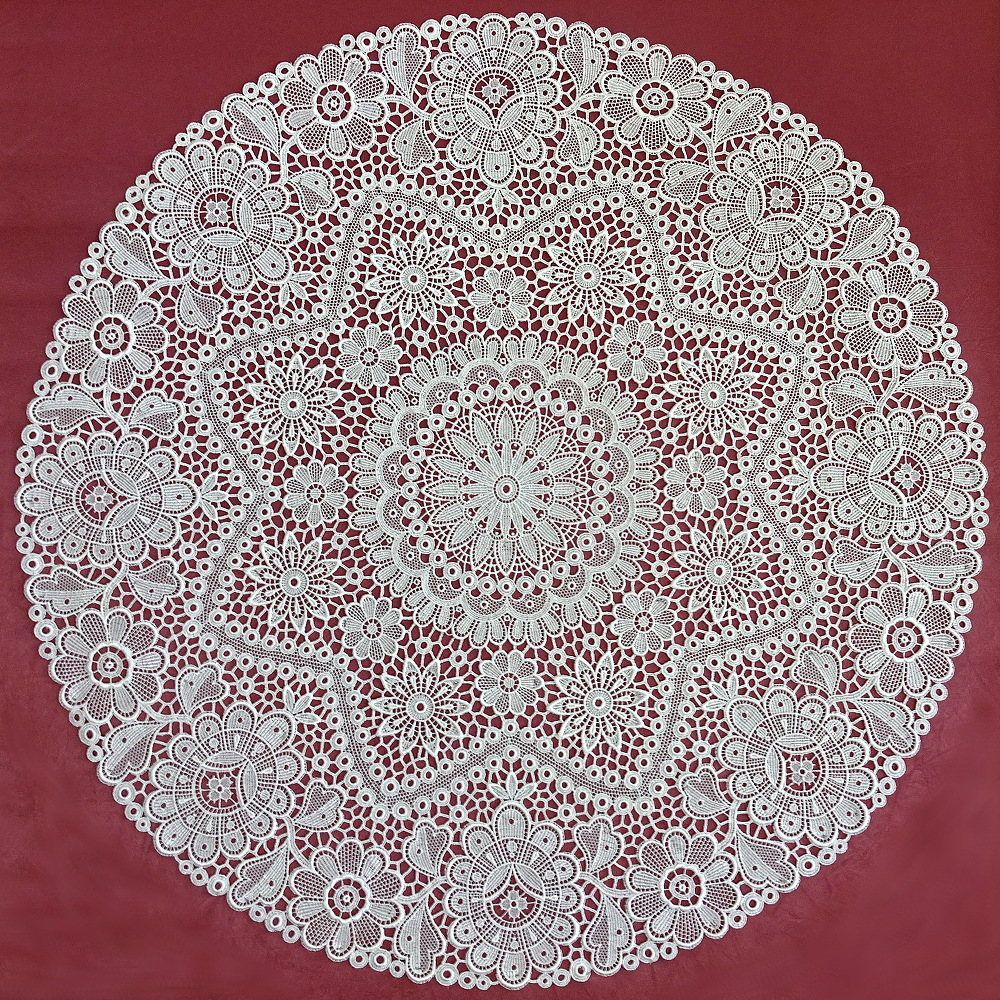 Typische Spitzendecke aus Plauener Spitze mit einem Durchmesser von 120 cm